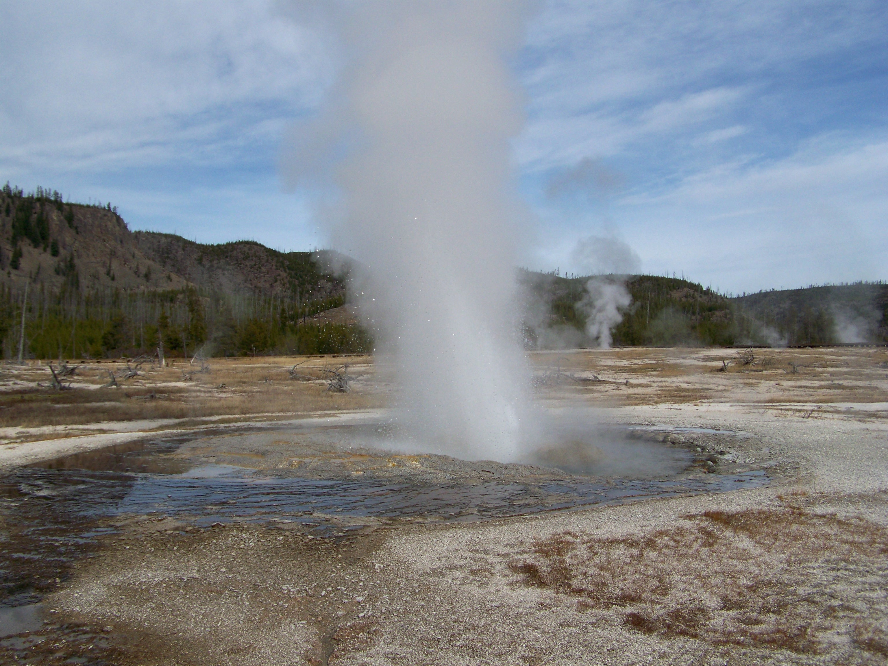 Jewel Geyser, Upper Geyser Basin